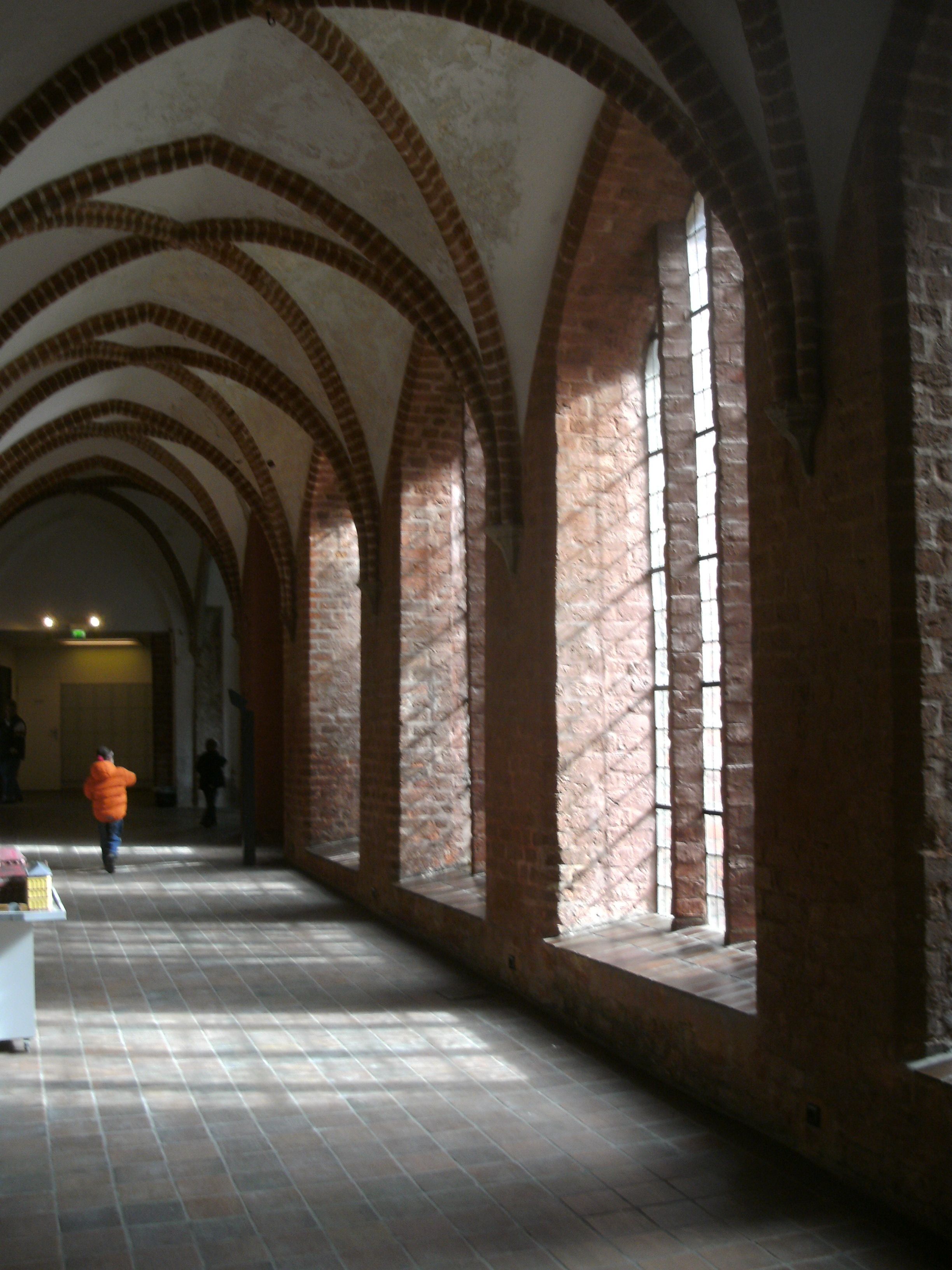 Stralsund, Klostergang im Erdgeschoss des ehemaligen Katharinenklosters, der zur Hauptsammlung des Kulturhistorischen Museums führt, die dort untergebracht ist